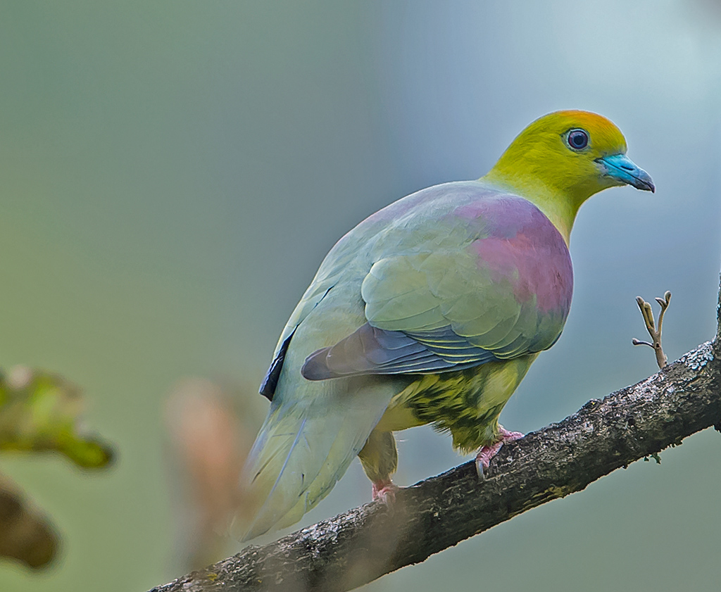 Chopta, Uttarakhand. April 2016